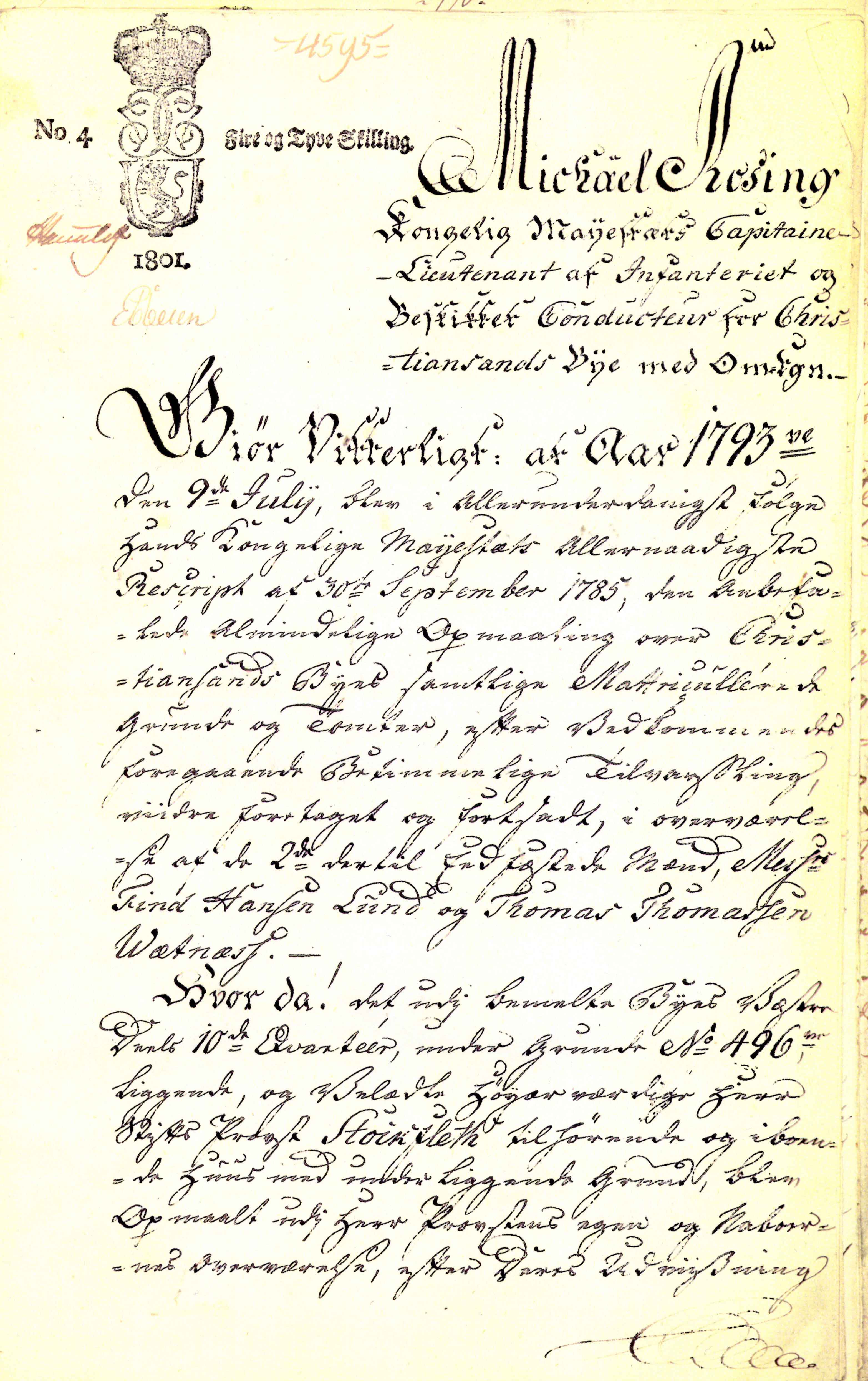 Tinglysning: Dokument, opprettet i 1793 og tinglyst i 1801 – Side 1 av et målebrev i Kristiansand.